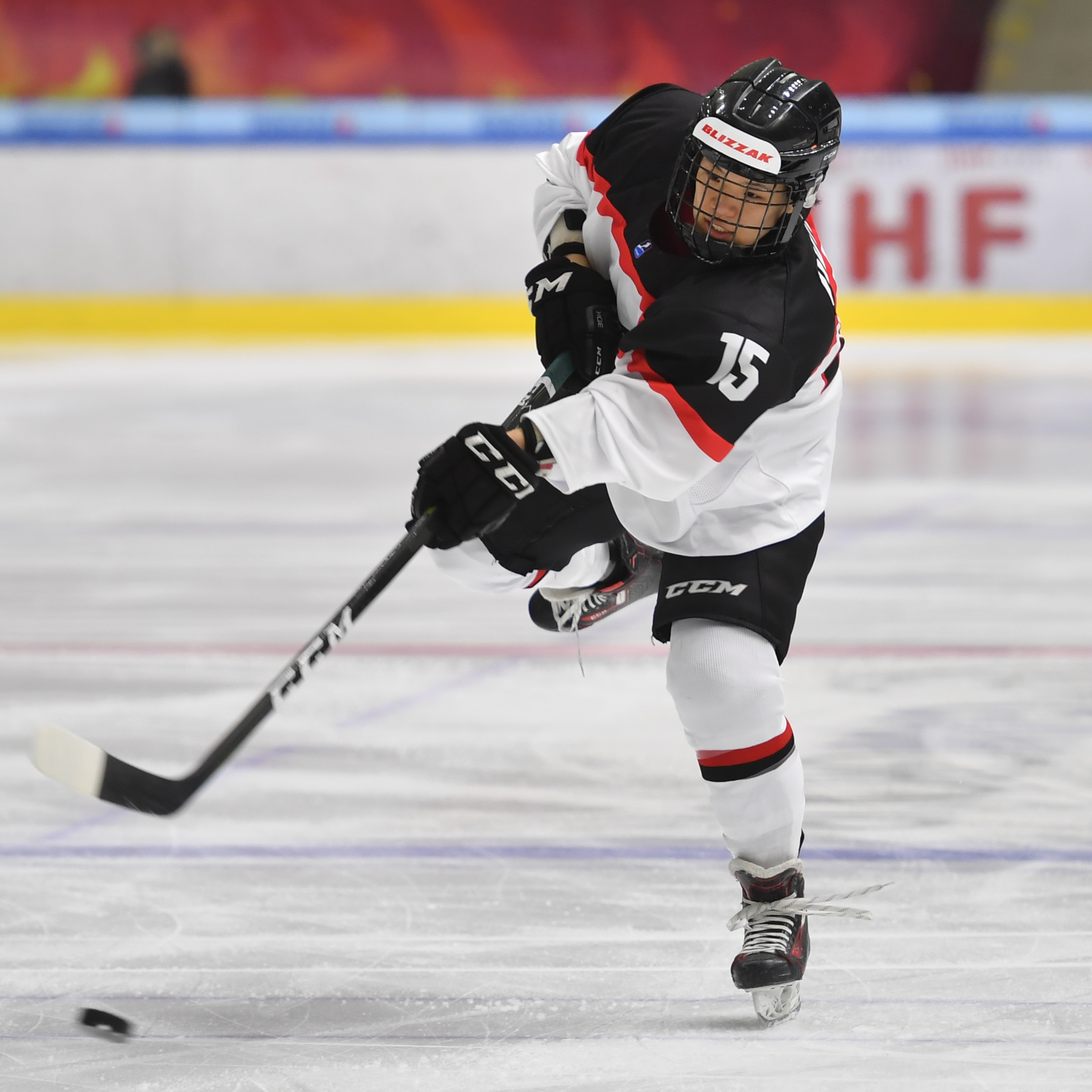 IIHF Eishockey Damen Weltmeisterschaft Division IA am 16. April 2017 in Graz.Bild zeigt Rui UKITA (JPN).